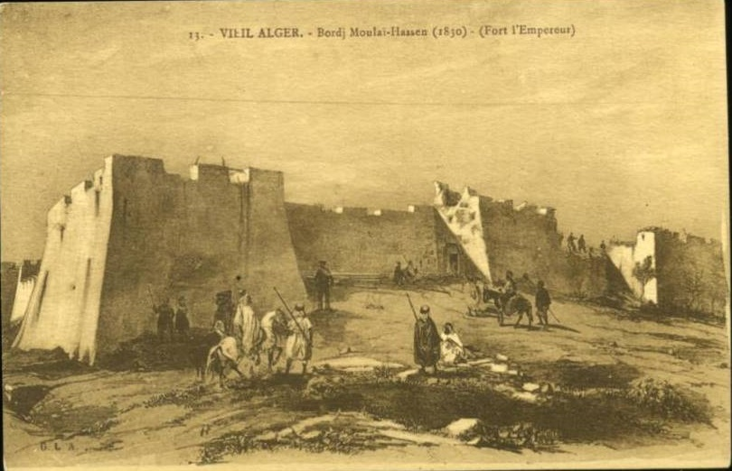 Bordj Moulay Hassan, ou Fort l'Empereur en 1830